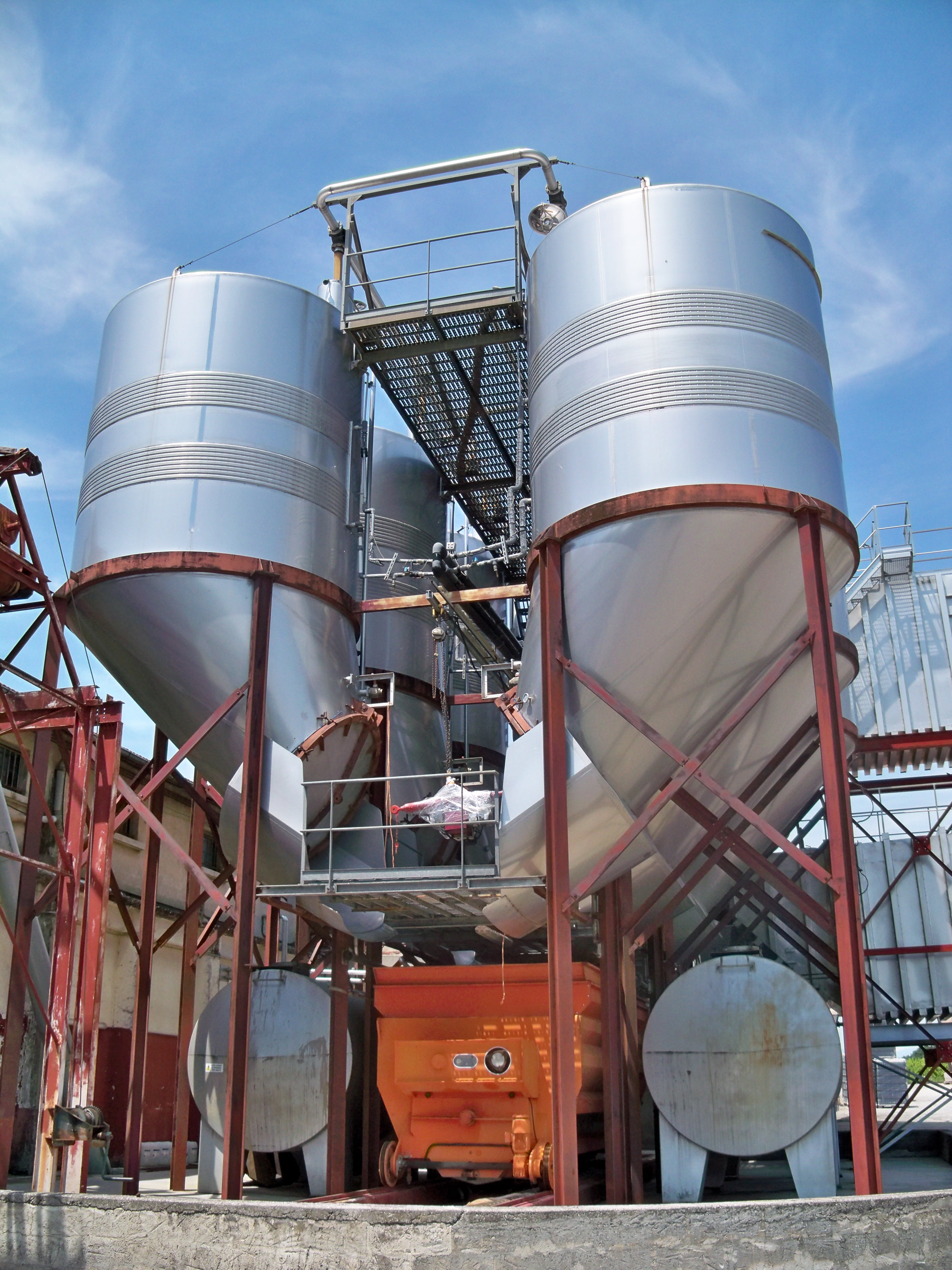 Cuves autovidantes